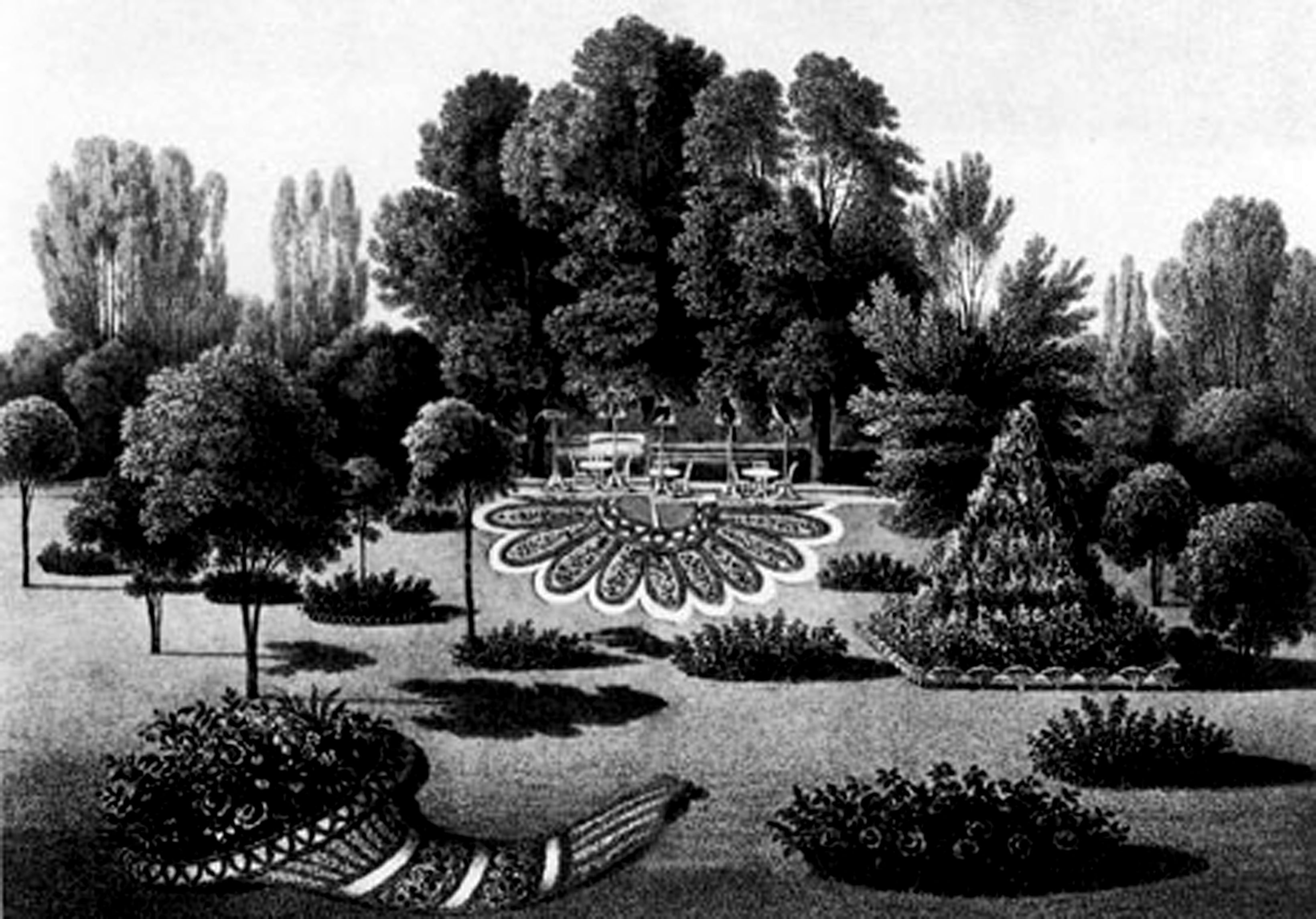 Der Blumengarten in Muskau vom Schloss ausgesehen